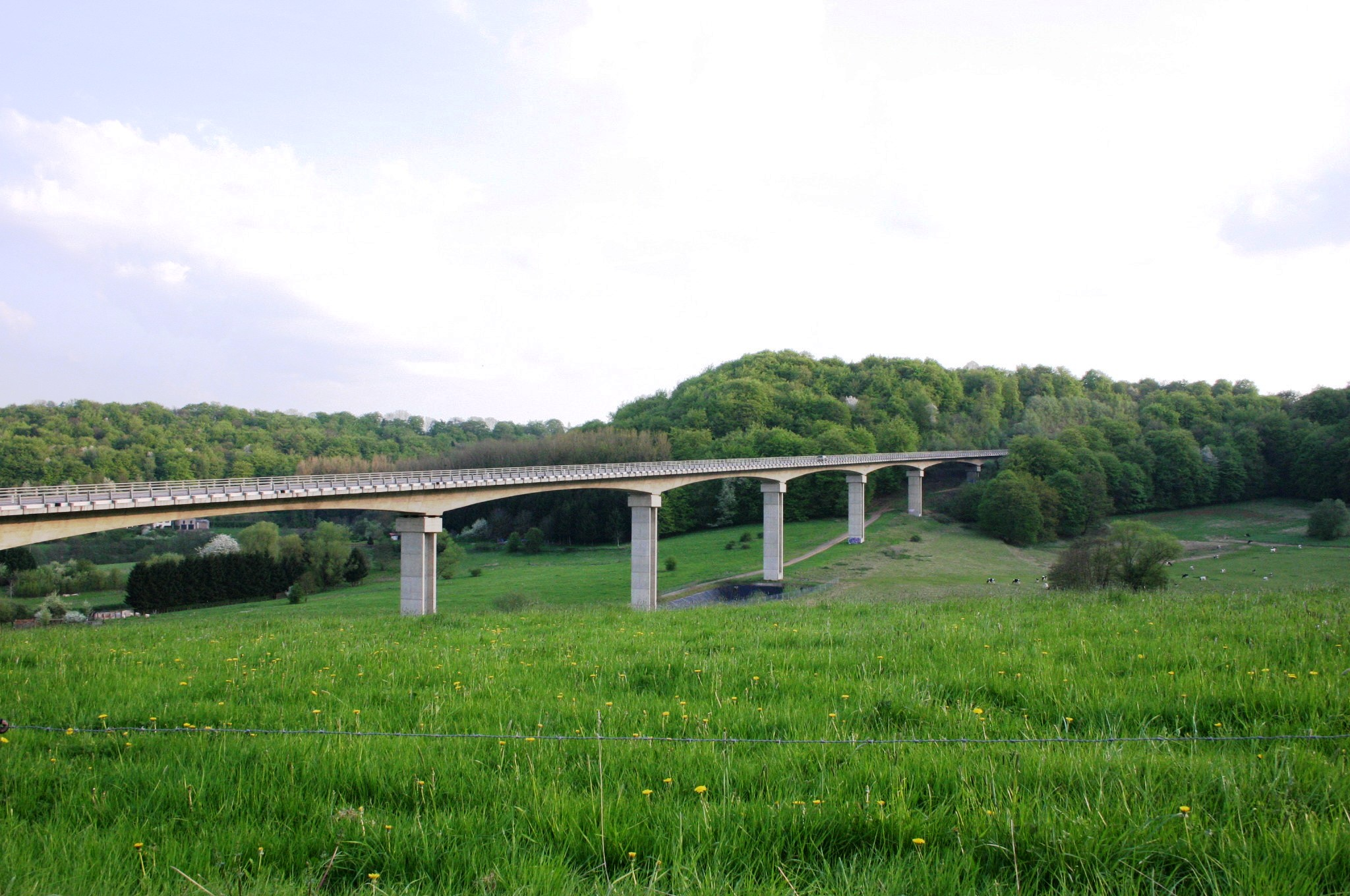 De Viaduc vu Piedmont aus gesinn